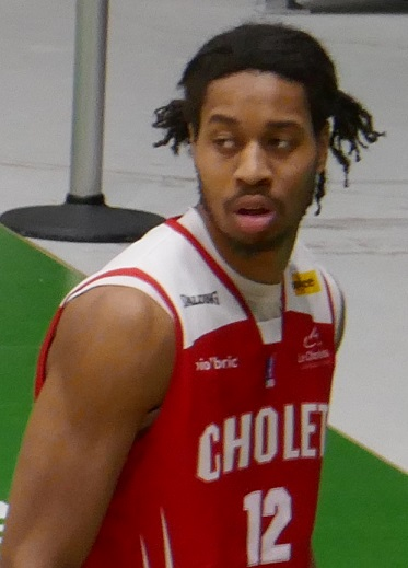 Cousins Isaiah avec Cholet, en avril 2018